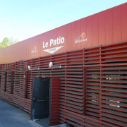 Entrée du Patio du Jas-de-Bouffan